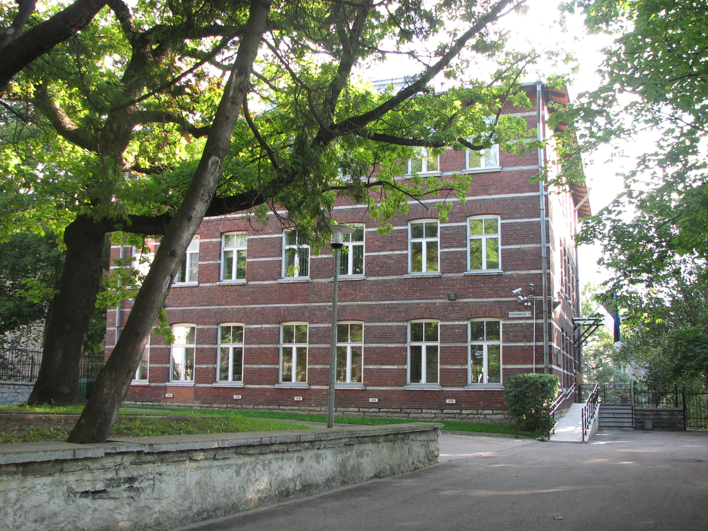 Elamu Tõnismägi 11